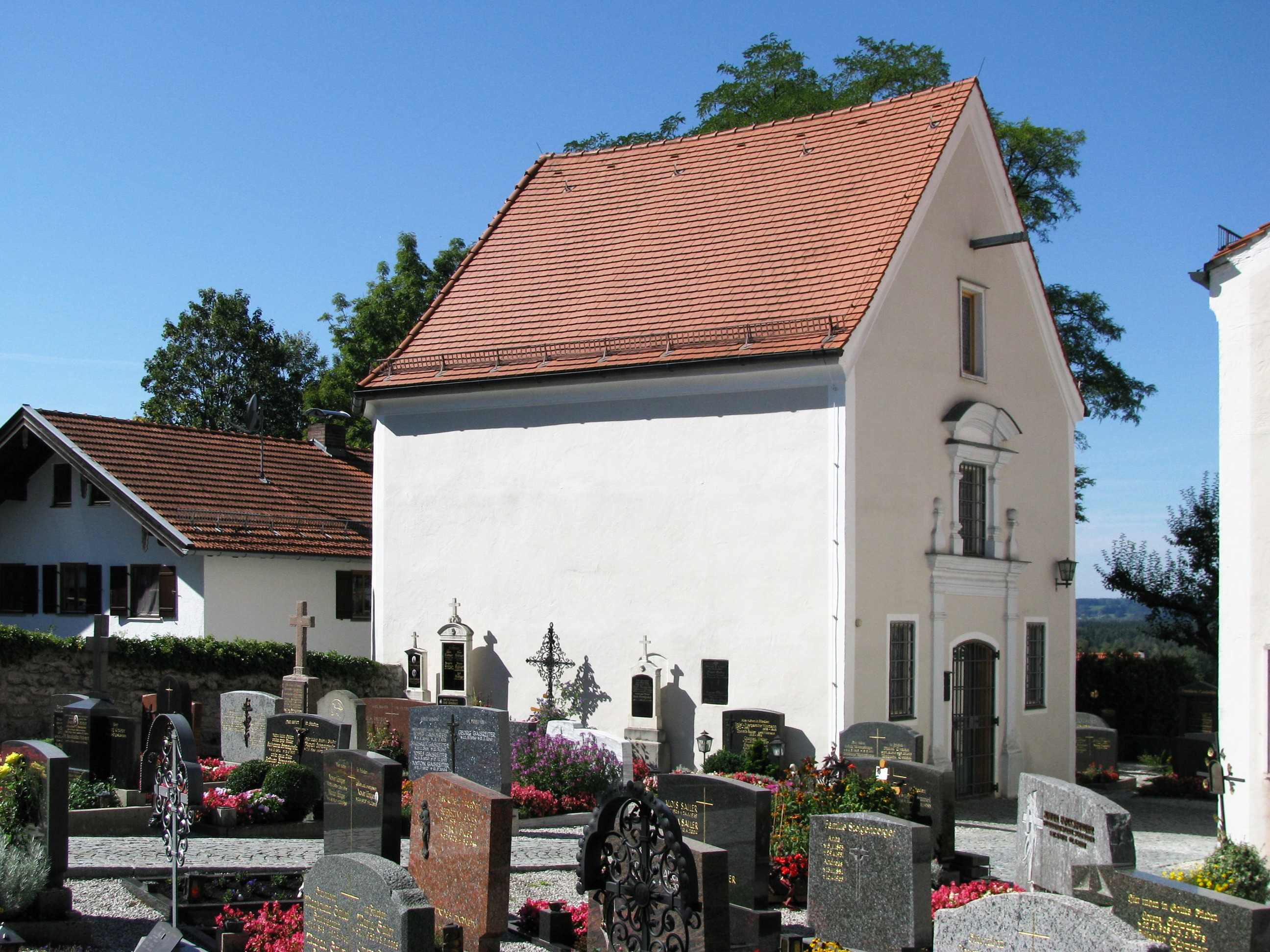 Friedhofskapelle St. Michael, barocker Saalraum, Kern wohl 16./17. Jh, 1733 umgestaltet. This is a photograph of an architectural monument.